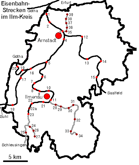 Alle Eisenbahnstrecken, die jemals im Ilm-Kreis verliefen. Grau sind stillgelegte Strecken dargestellt. Bahnhöfe: Erfurt-Ilmenauer Eisenbahn 1.Sülzenbrücken 2.Haarhausen 3.Arnstadt - Hbf. 4.Arnstadt - Süd 5.Plaue 6.Martinroda 7.Geraberg 8.Elgersburg 9.Ilmenau-Roda 10.Ilmenau - Pörlitzer Höhe 11.Ilmenau Arnstadt-Saalfelder Eisenbahn 12.Marlishausen 13.Niederwillingen 14.Stadtilm 15.Singen Strecke Plaue - Suhl - Meiningen 16.Gräfenroda 17.Dörrberg 18.Gehlberg Ohrabahn 19.Gräfenroda - Ort 20.Frankenhain Rennsteigbahn 21.Ilmenau - Bad 22.Manebach 22a.Meyersgrund (bis 1920) 23.Stützerbach 24.Bf. Rennsteig 25.Schmiedefeld am Rennsteig 26.Allzunah 27.Frauenwald Ilmenau-Großbreitenbacher Eisenbahn 28.Ilmenau - Grenzhammer 29.Langewiesen 30.Gehren - Stadt 31.Gehren - Bf. 32.Möhrenbach 33.Neustadt-Gillersdorf 34.Großbreitenbach Kleinbahn Arnstadt-Ichtershausen 35.Arnstadt - Ost 36.Arnstadt - Bierweg 37.Rudisleben 38.Ichtershausen - Ort 39.Ichtershausen - Bf.